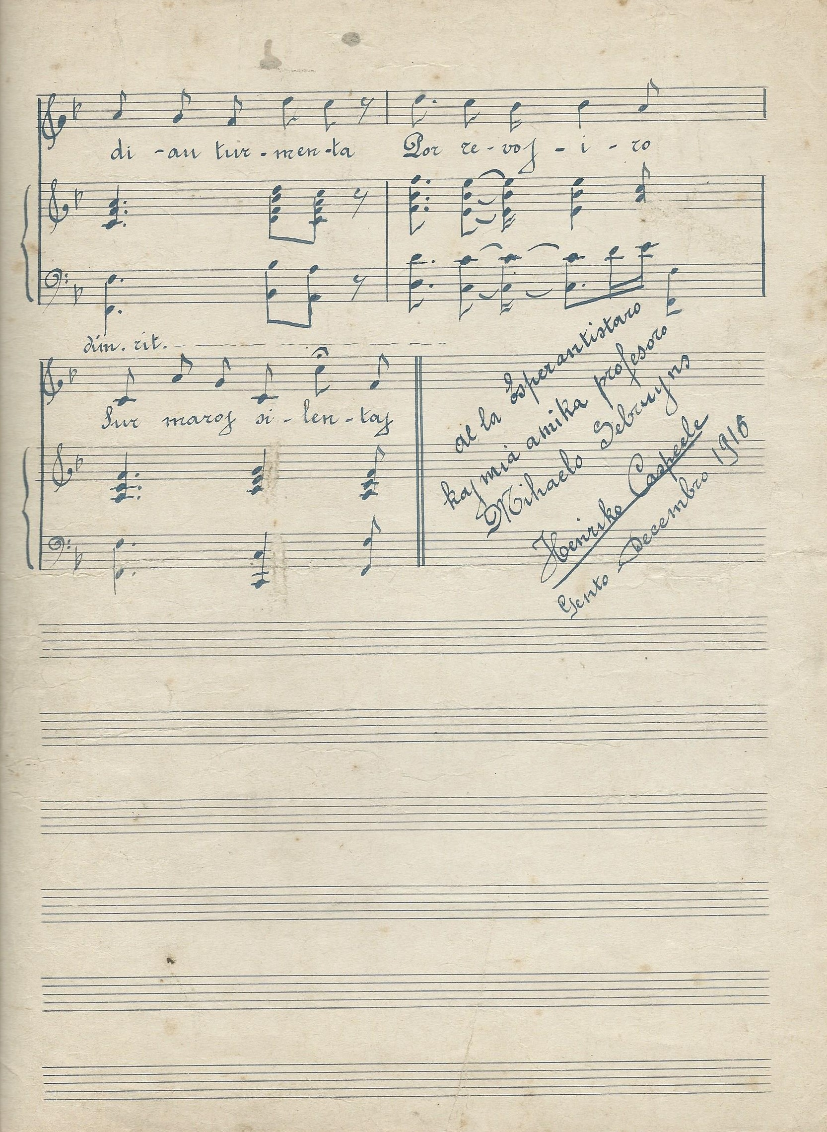 "La_Renkonto_de_Ŝipoj", Gento, 1916